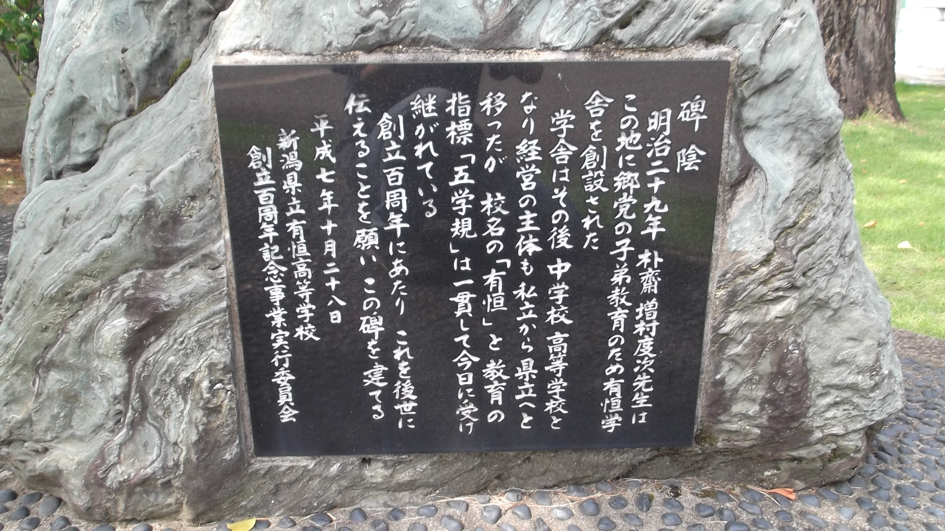 創立100周年記念石碑（新潟県上越市）